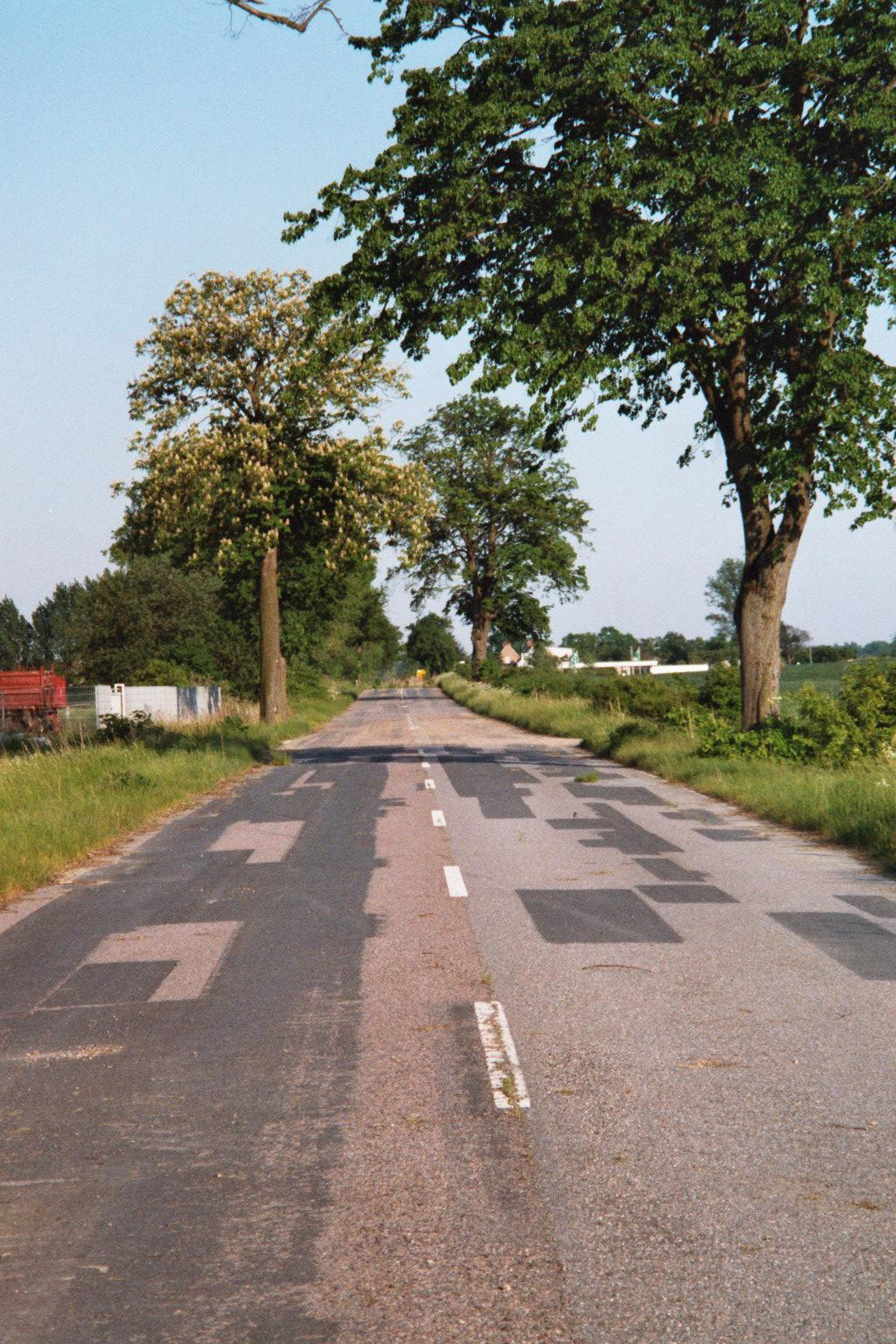 Alte B 192 westlich von Penzlin